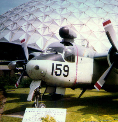 Deze foto is gemaakt door Ramón Vasconcellos en valt onder de "GNU Vrije Documentatie Licentie".